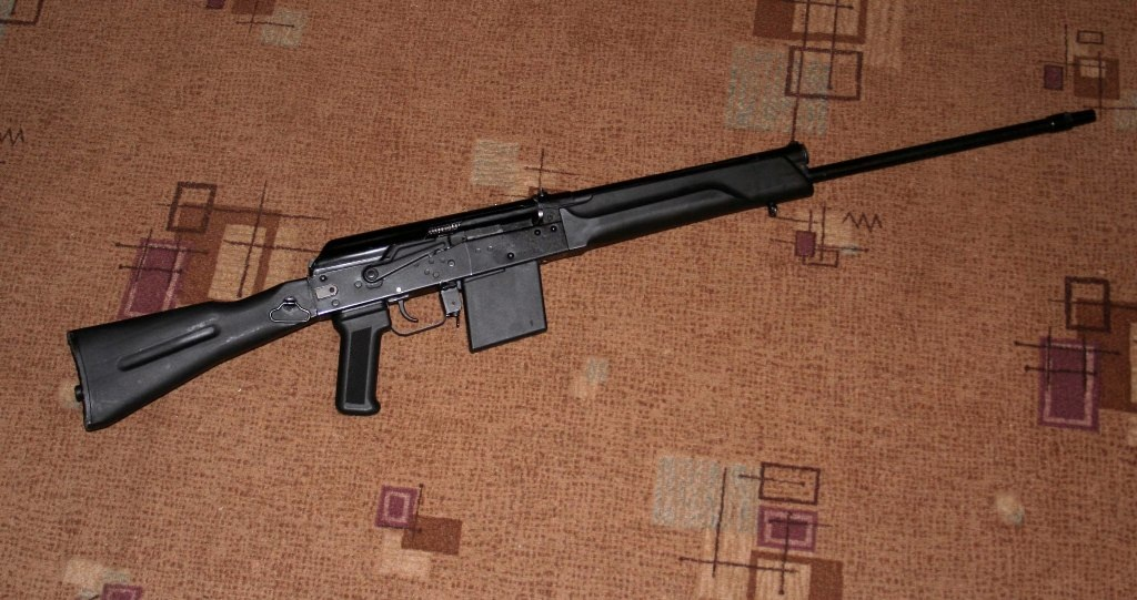 Охотничий карабин